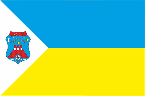 Прапор Хуста